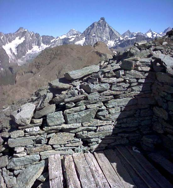 ruderi del bivacco Georges Carrel su Grand Tournalin. Valle d'Aosta, Italia.